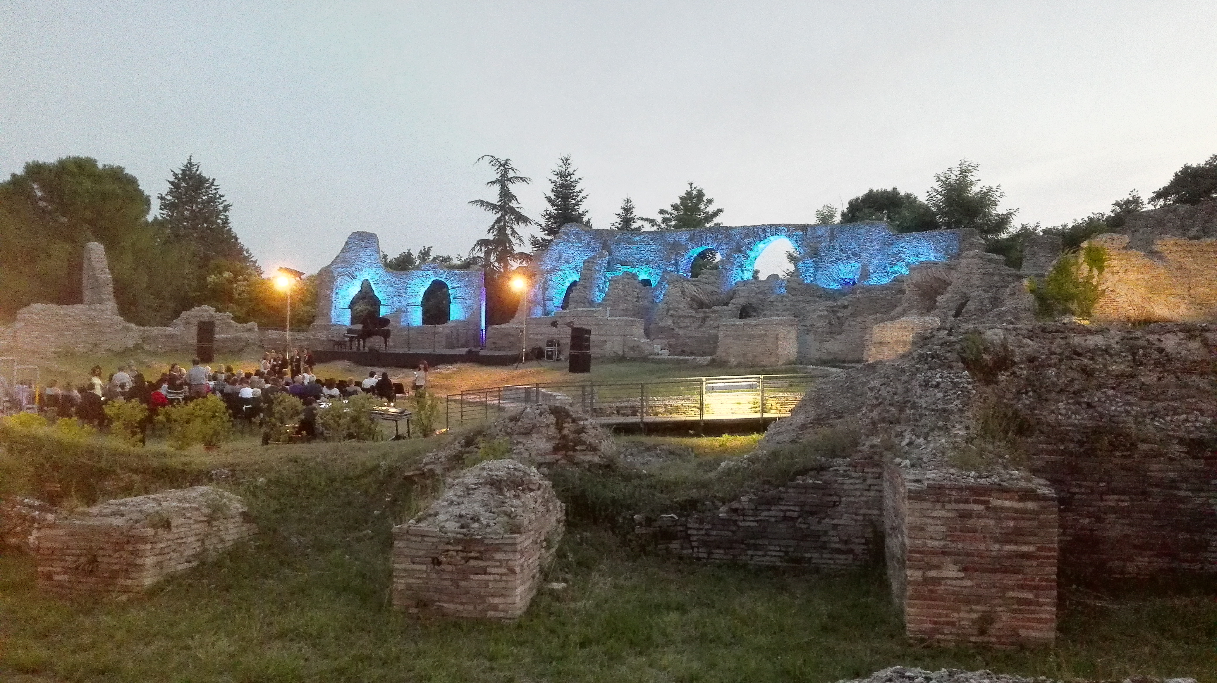 Teatro Romano di "Helvia Recina" - MIBAC This is a photo of a monument which is part of cultural heritage of Italy.